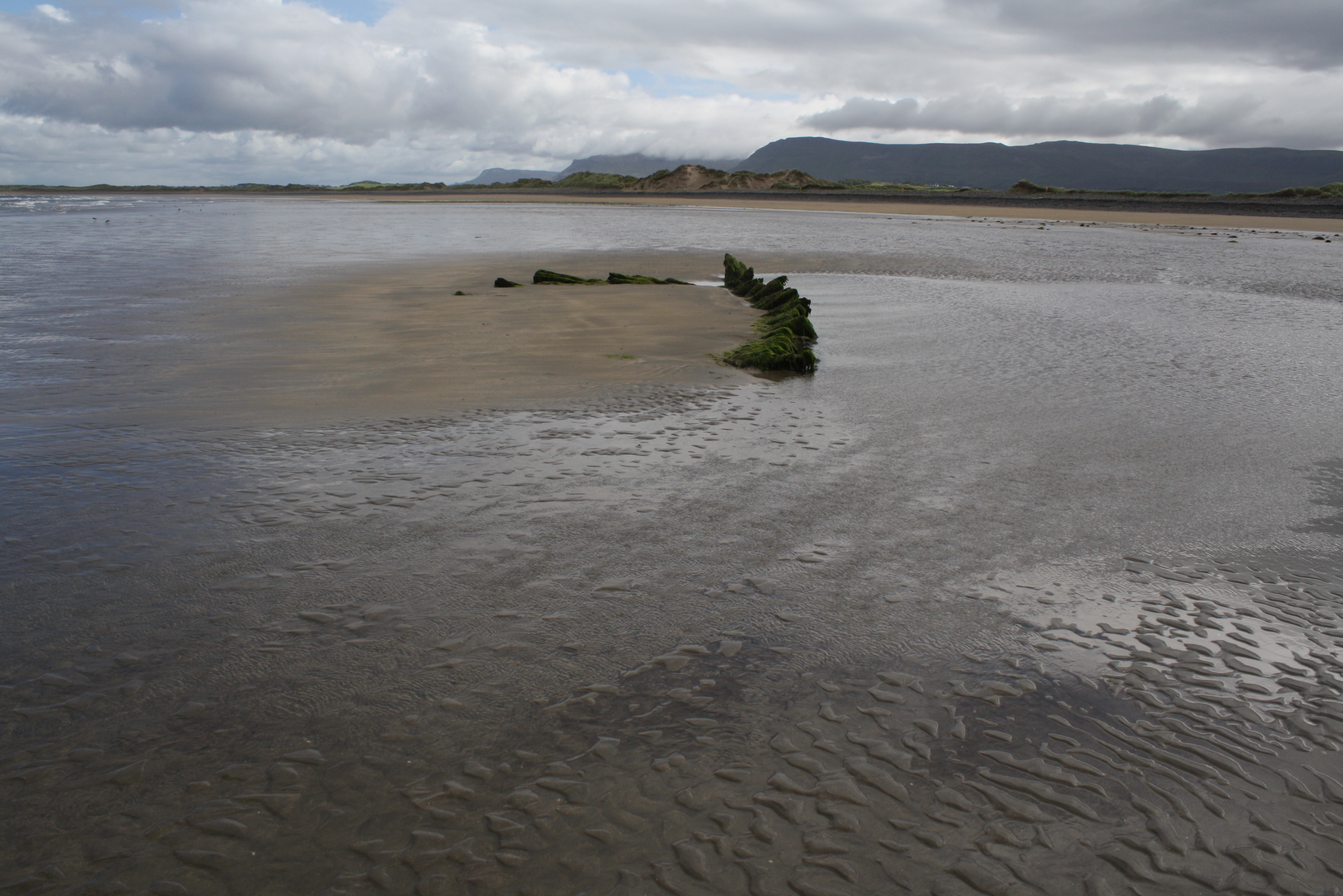 Streedagh Strand, Comté de Sligo, Irlande - épave affleurante